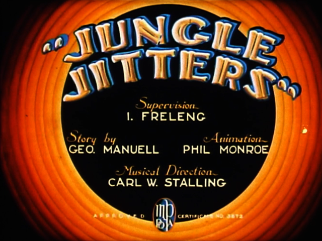 Introducción de la caricatura 'Jungle Jitters' (1938).